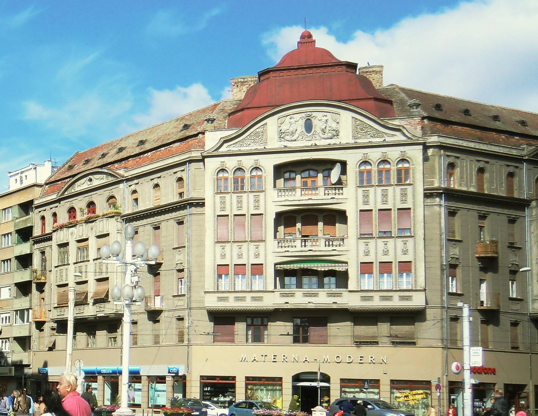 Piaţa Victoriei (Timişoara)